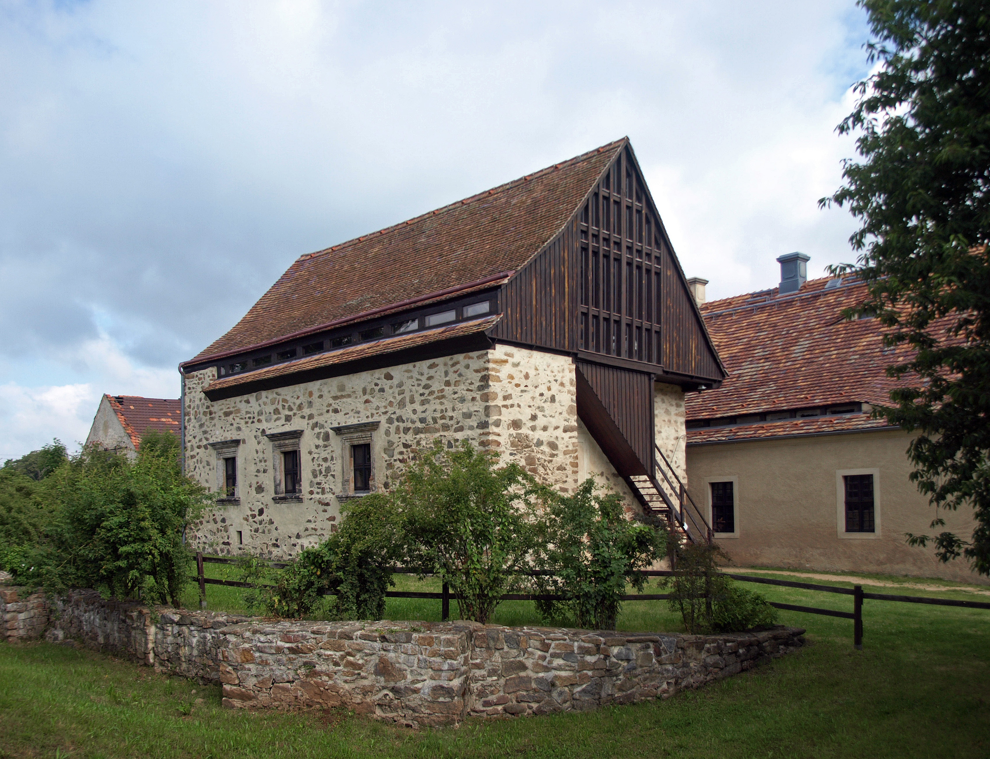 Steinstock in Königshain, ältestes Gebäude im Ort